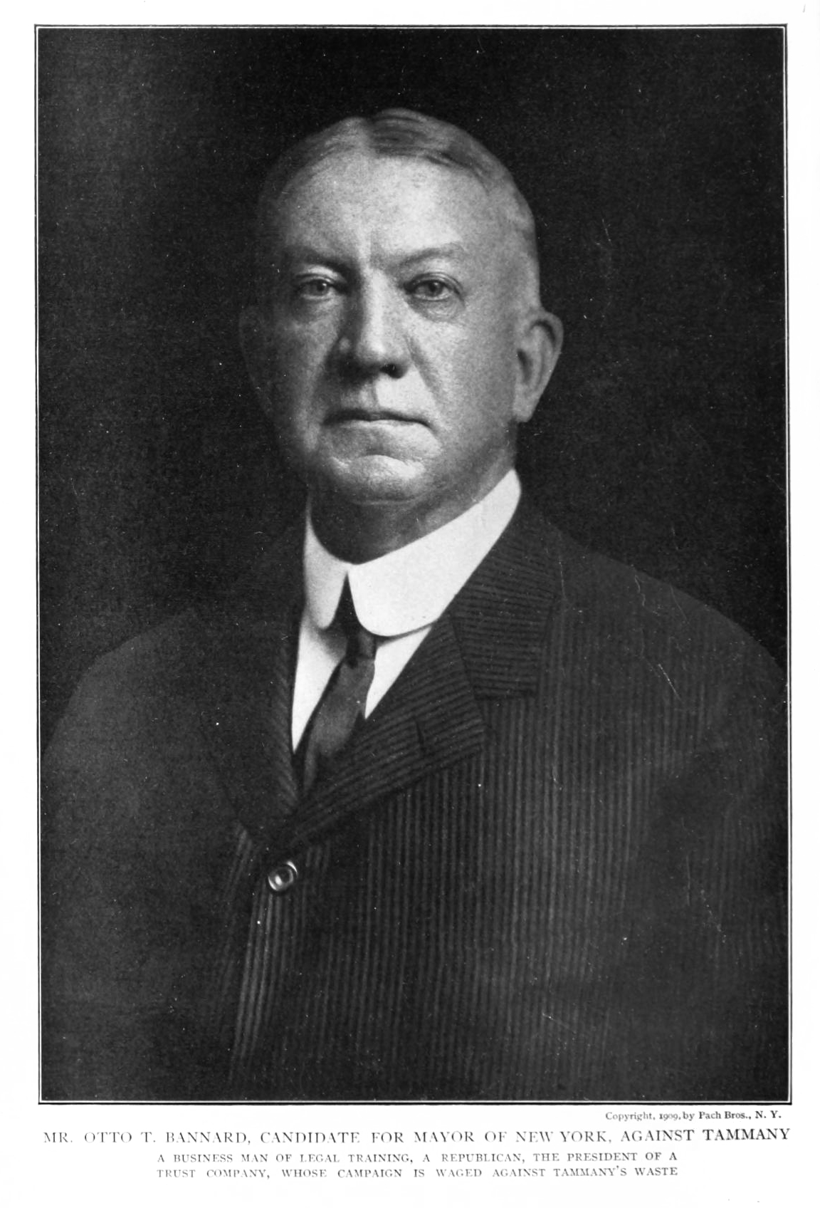 Otto T. Bannard (1854-1929)